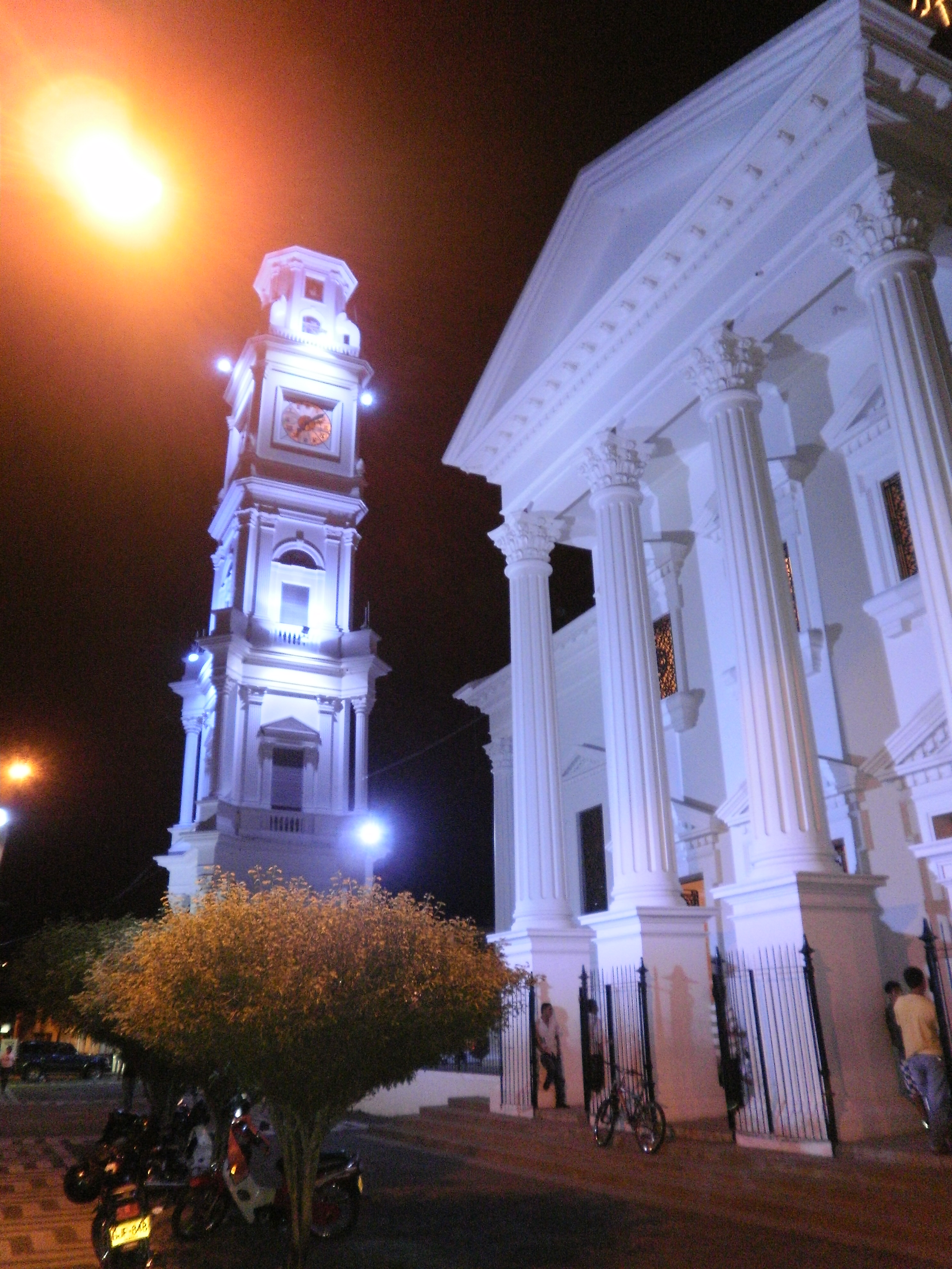 Catedral de Cartago